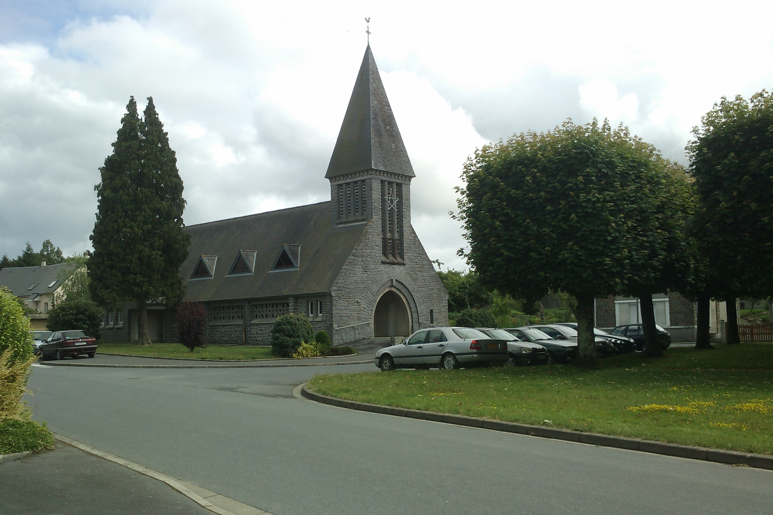 Église de Saint-André-de-l'Épine